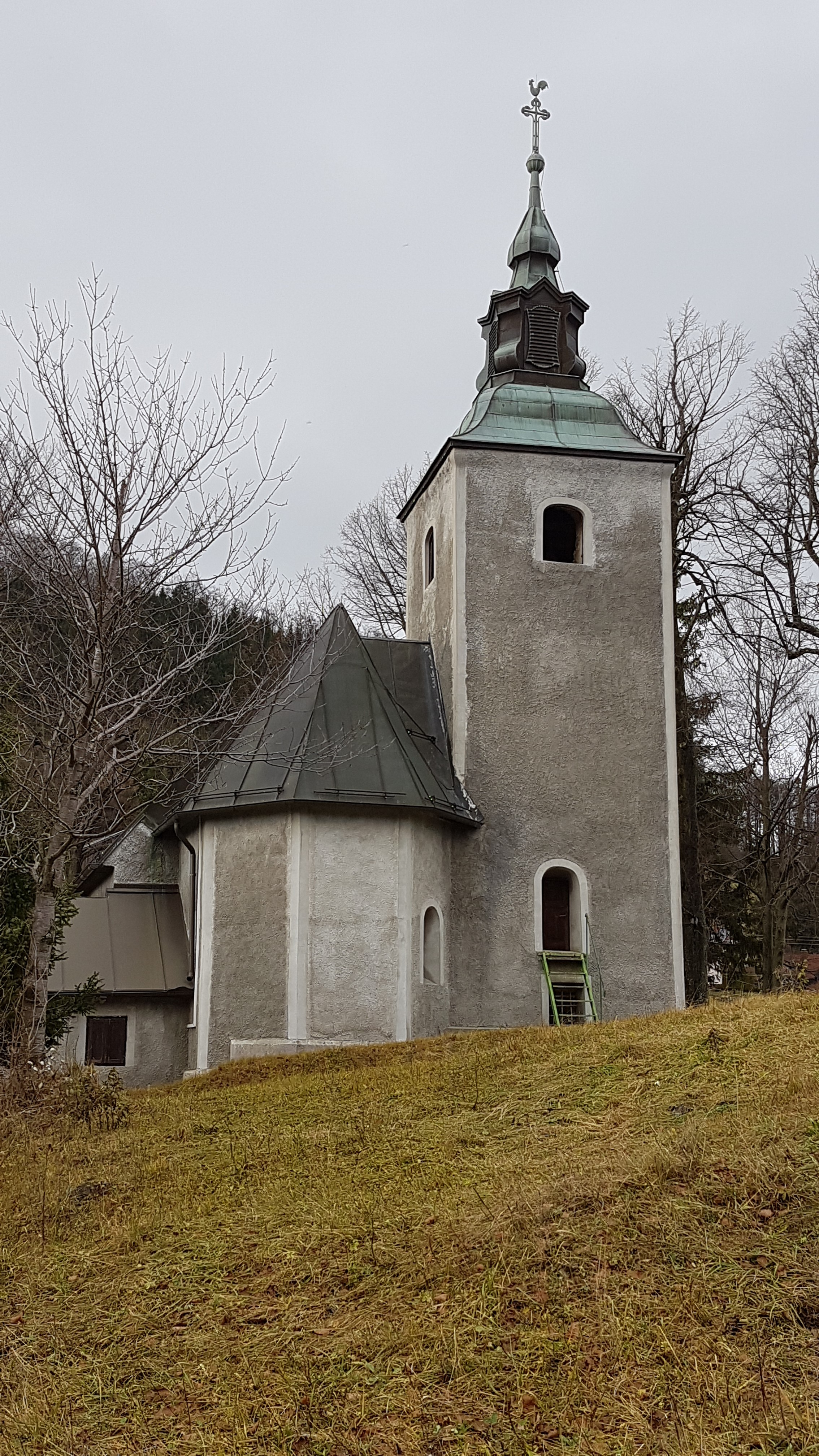 Cerkev sv. Lenarta, Vrhe nad Trbovljami